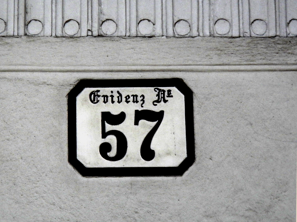 Evidenz Nummer 57 rechts vom Eingang des Stationsgebäudes Stadtpark an der Linie U4 (frühere Wiental-Linie der Stadtbahn) in Wien, Österreich